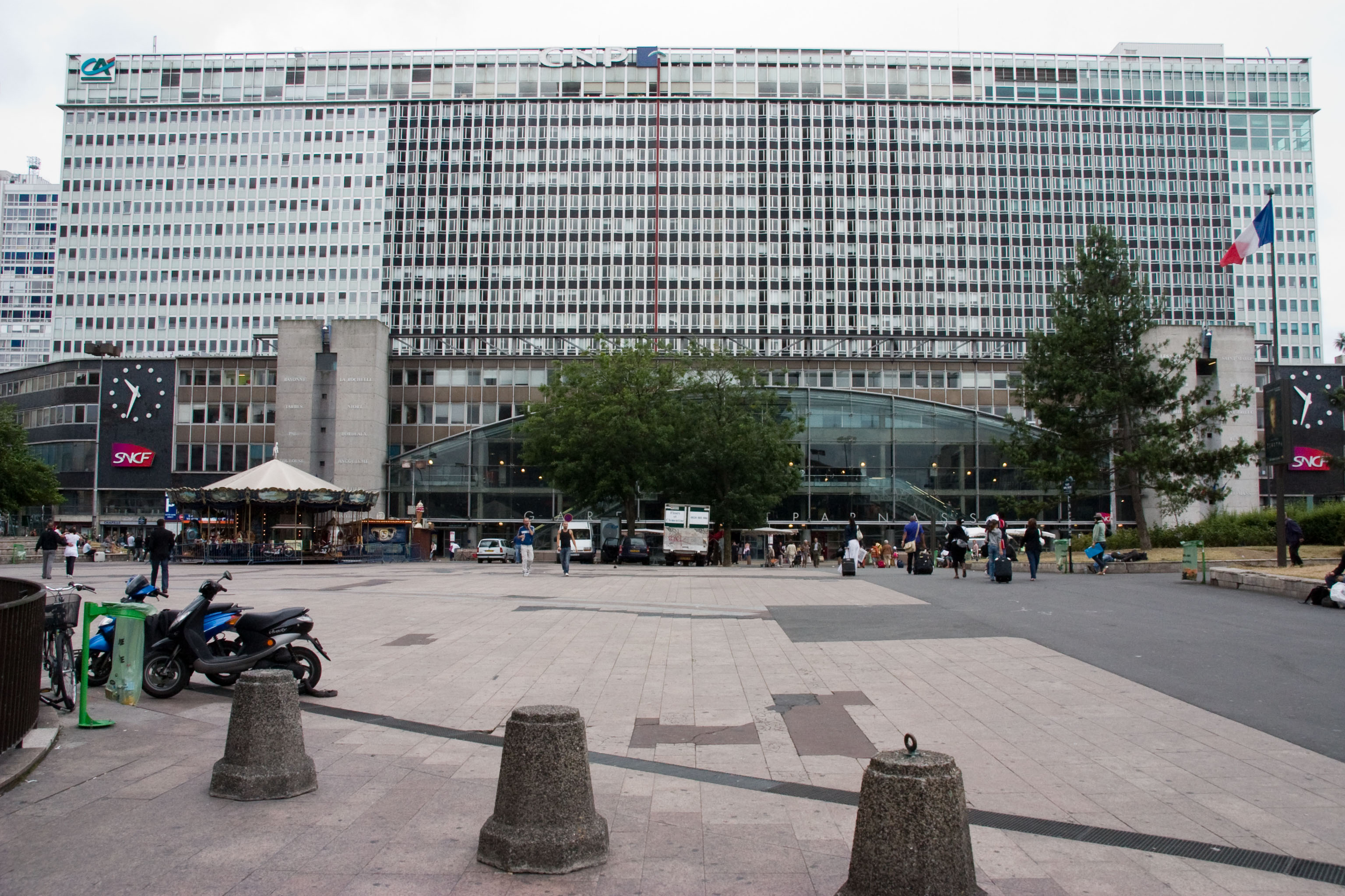 Gare de Paris-Montparnasse, Paris, France